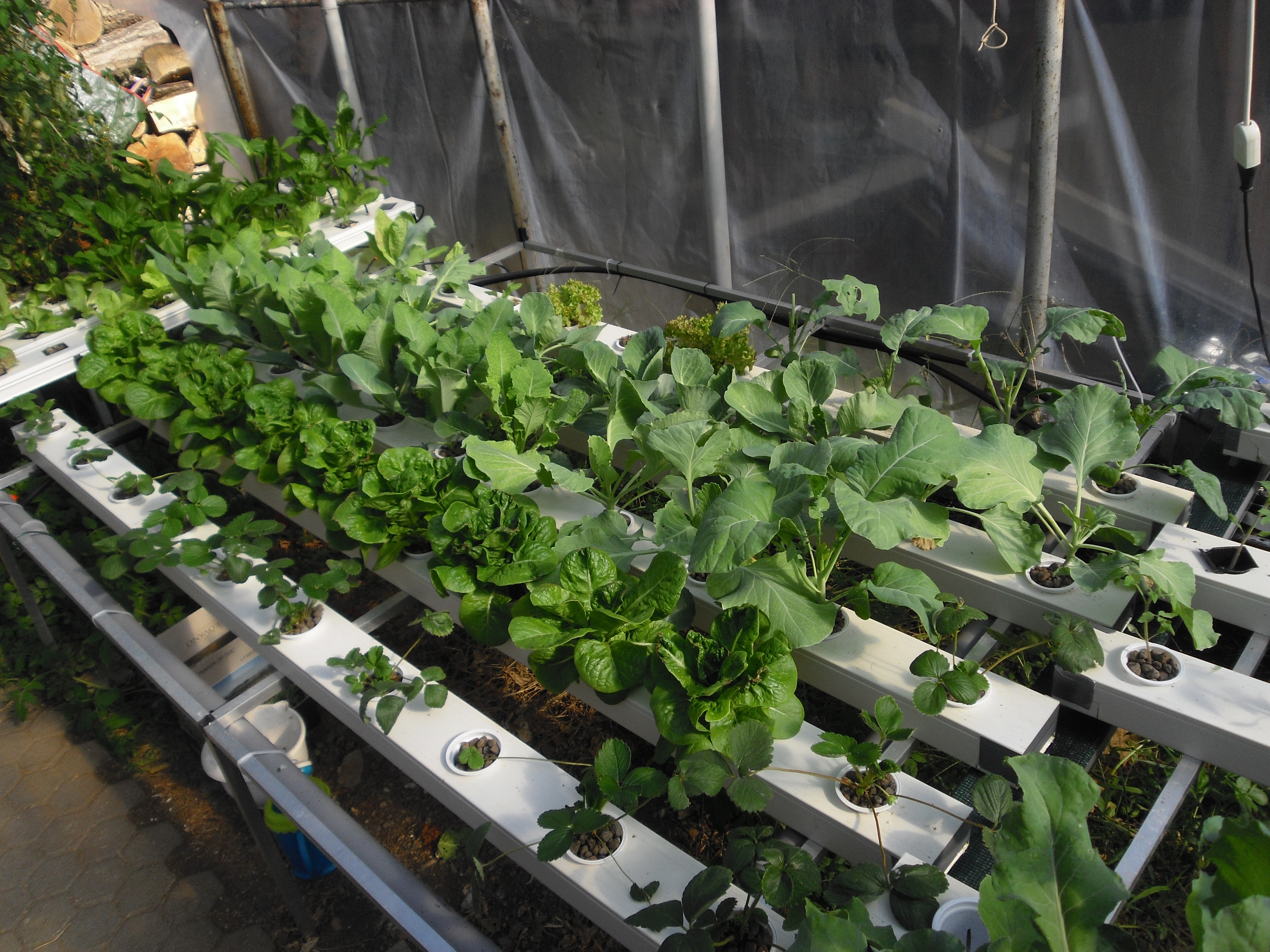 Idroponica autocostruita